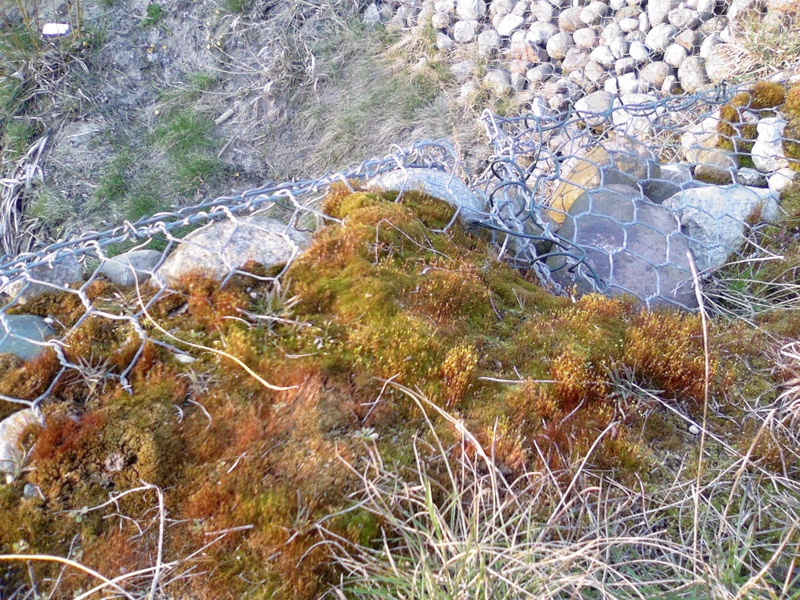 river Potok Oruński, near Kowale